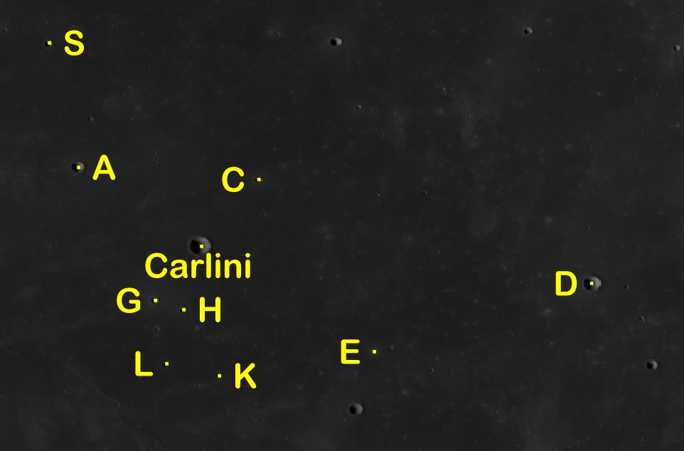 Cráter lunar Carlini. Cráteres satélite. (Imagen LRO)